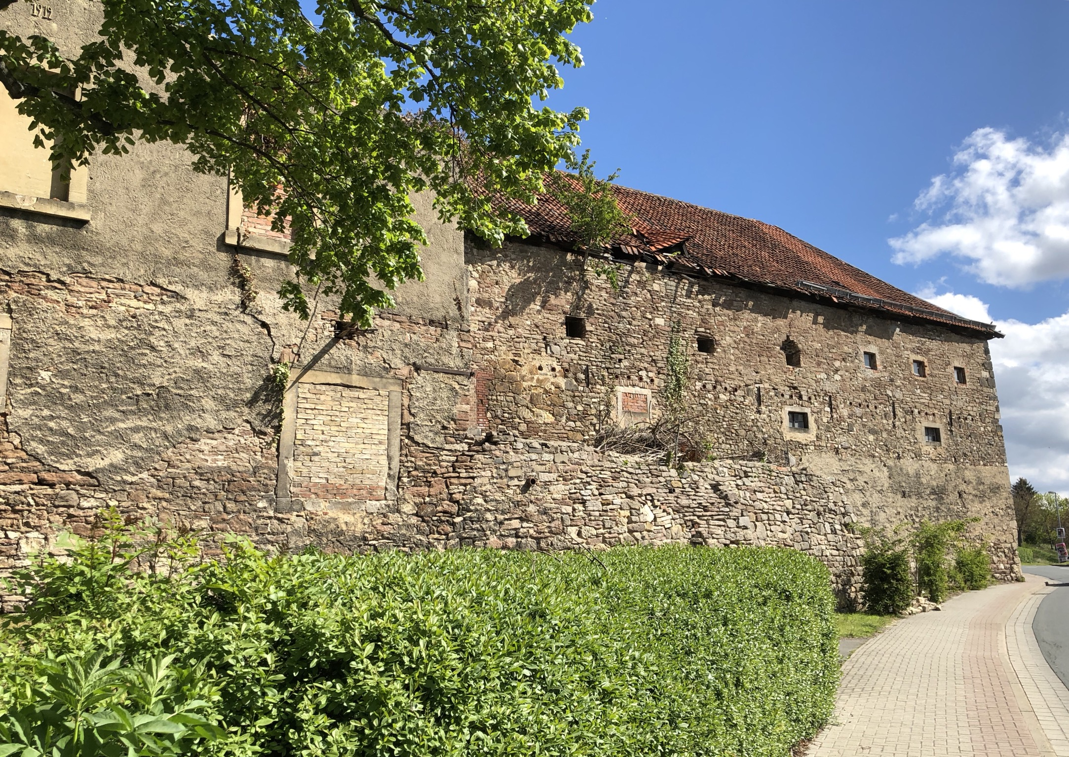 Domäne Heimburg